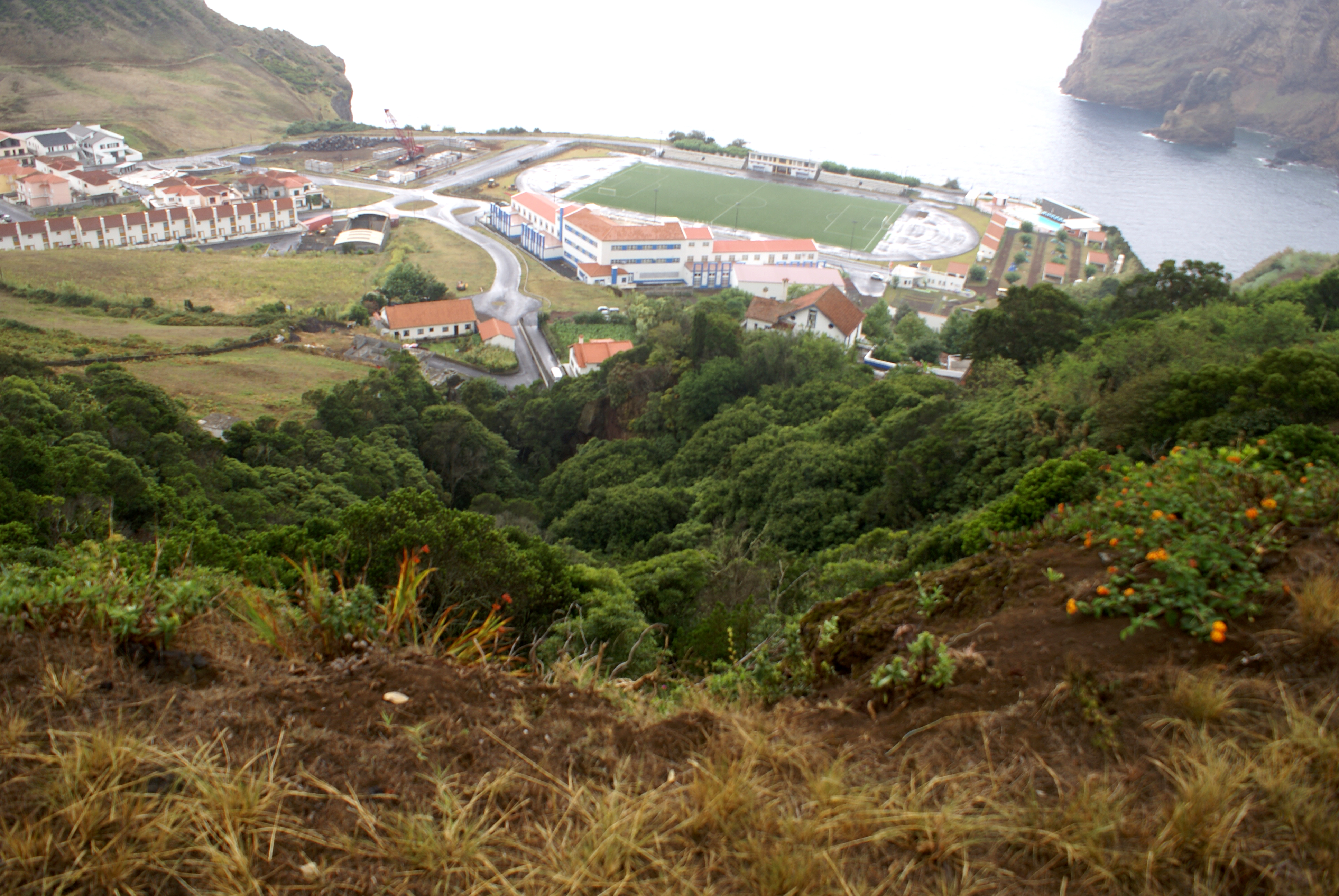 Miradouro do Canavial, vista para os Morros em dia de nevoeiro, Velas, ilhas de São Jorge, Açores